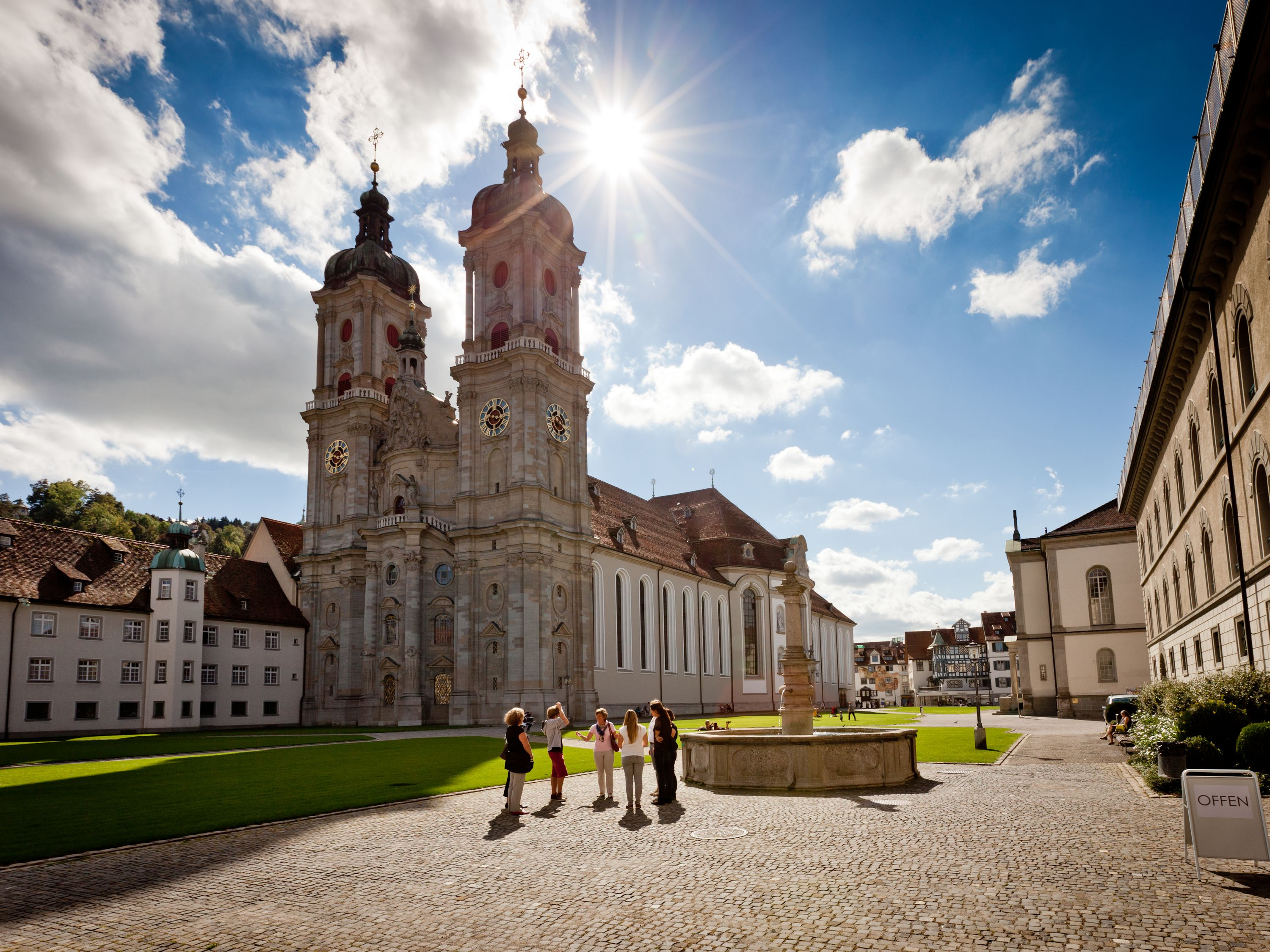 Stiftsbezirk St.Gallen mit Stiftsbibliothek